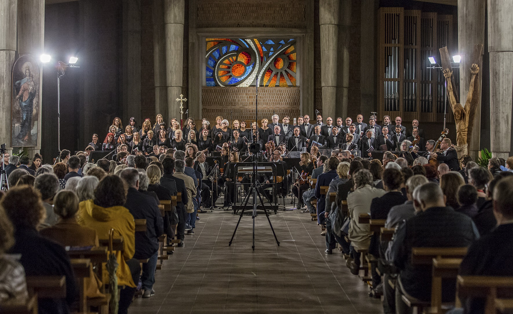 Esecuzione dell'Inno nel Duomo di Lignano nel 2018